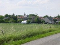 Stad aan 't Haringvliet